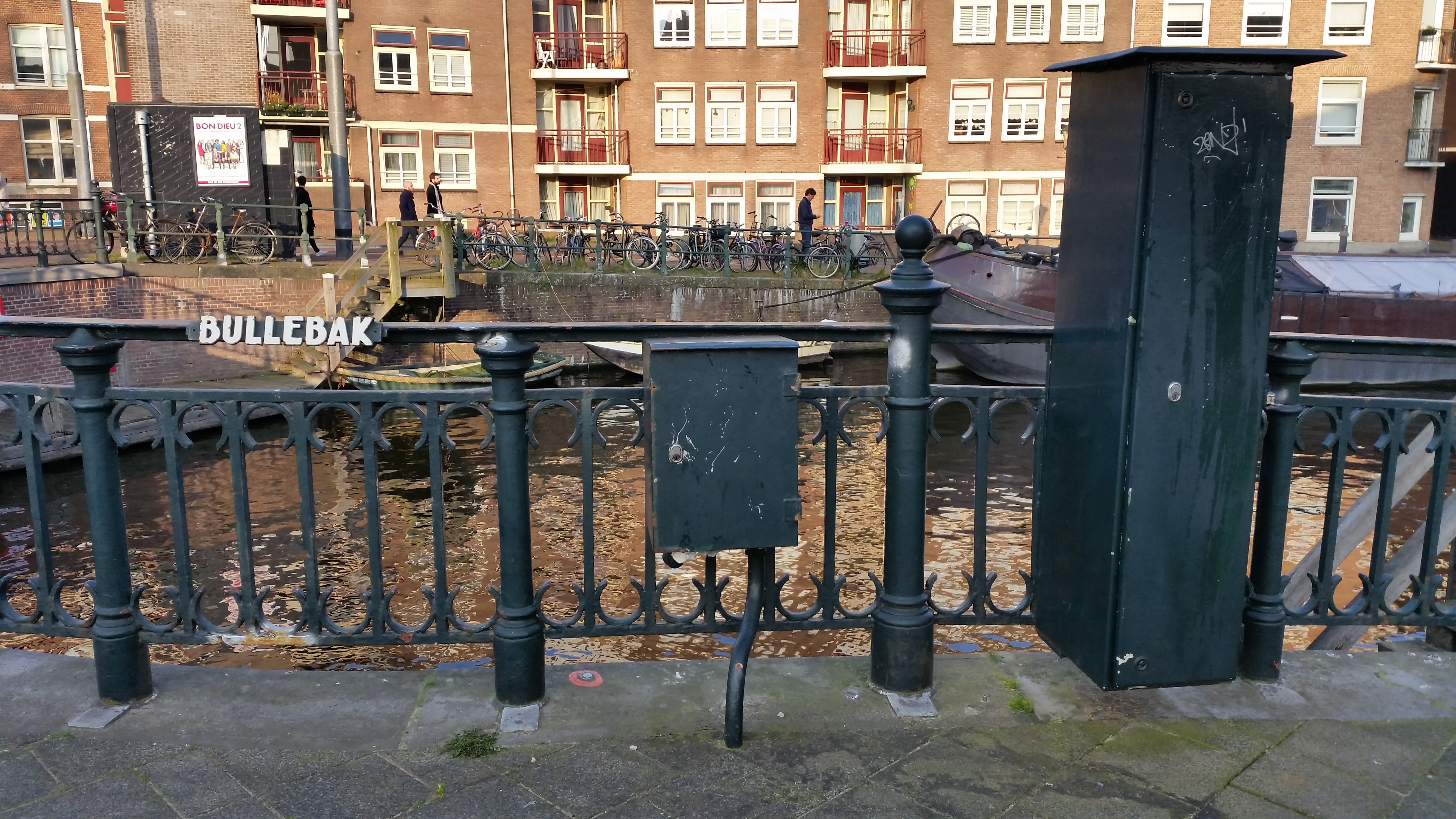 Naamplaat op doorlopende brugleuning van de Bullebak